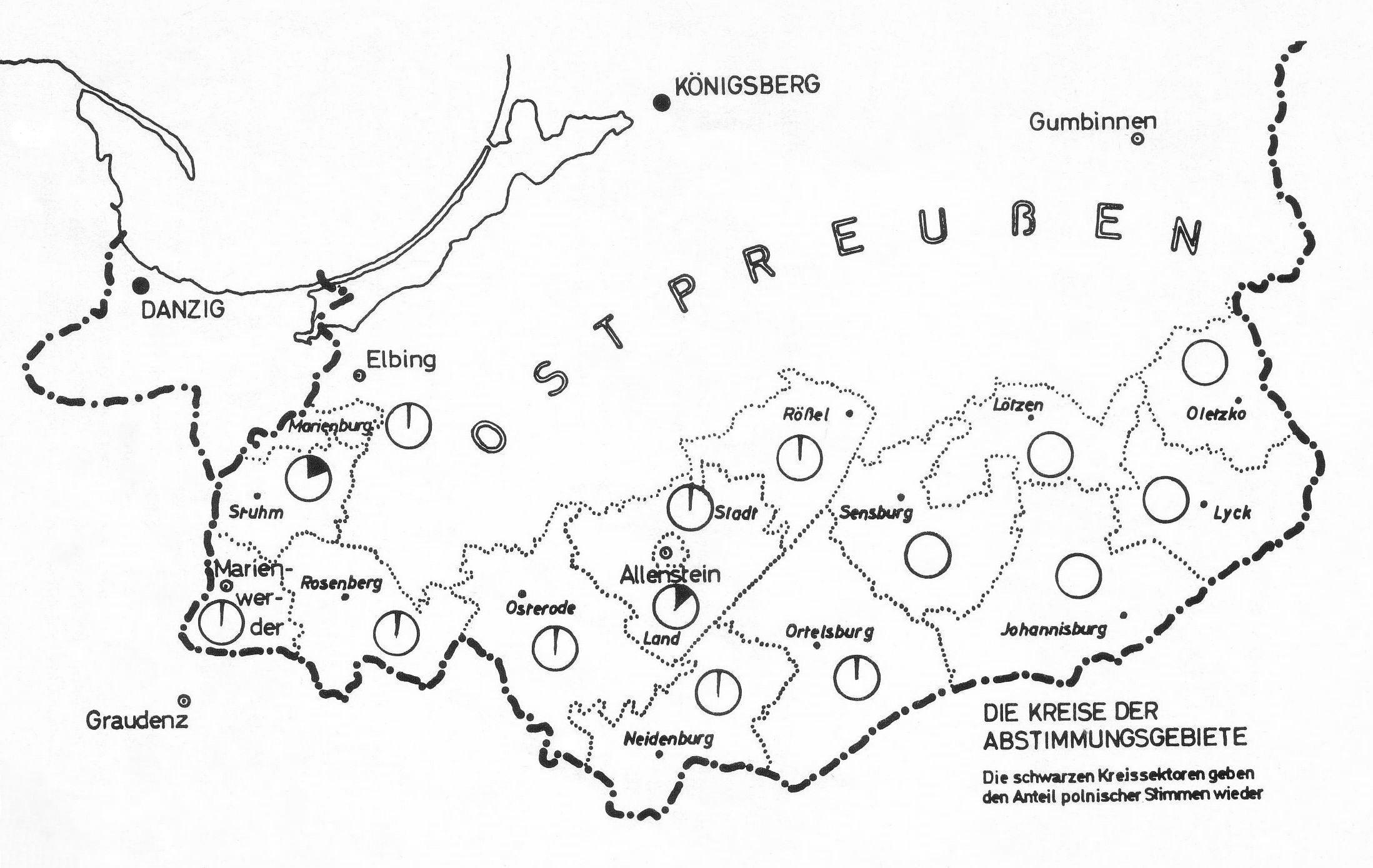 Graphische Darstellung der westpreußischen und masurischen Kreise und ihrer Wahlergebnisse bei der Abstimmung 1920